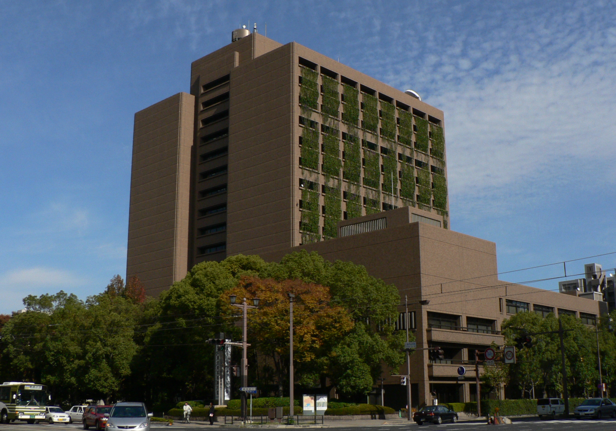 壁面緑化を行っている広島市役所。写真に写っているのは宿根性アサガオ。低層階ではゴーヤが使用されていた(ただし撮影時には撤去されていたはず)。